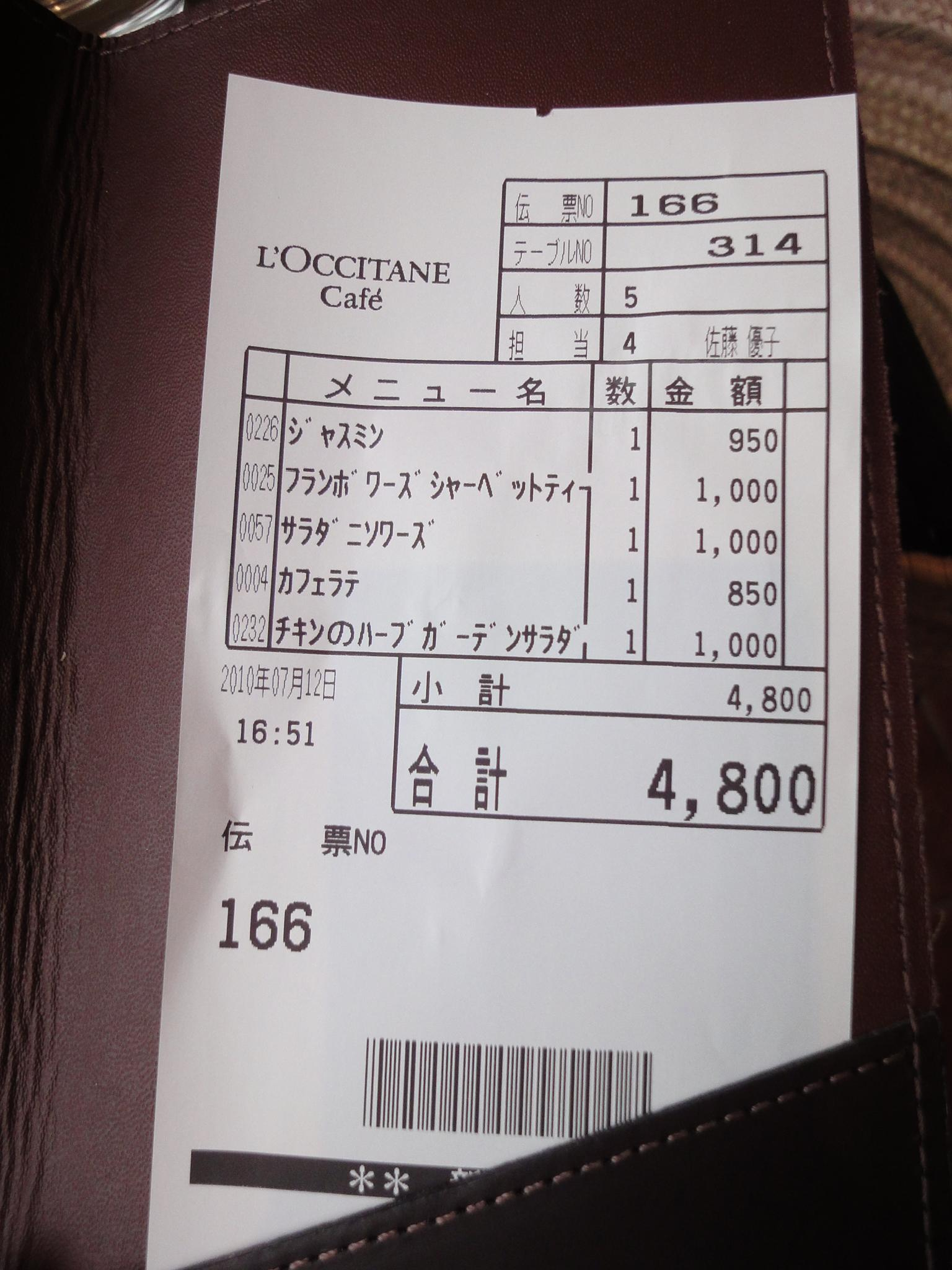 每個人都要消費